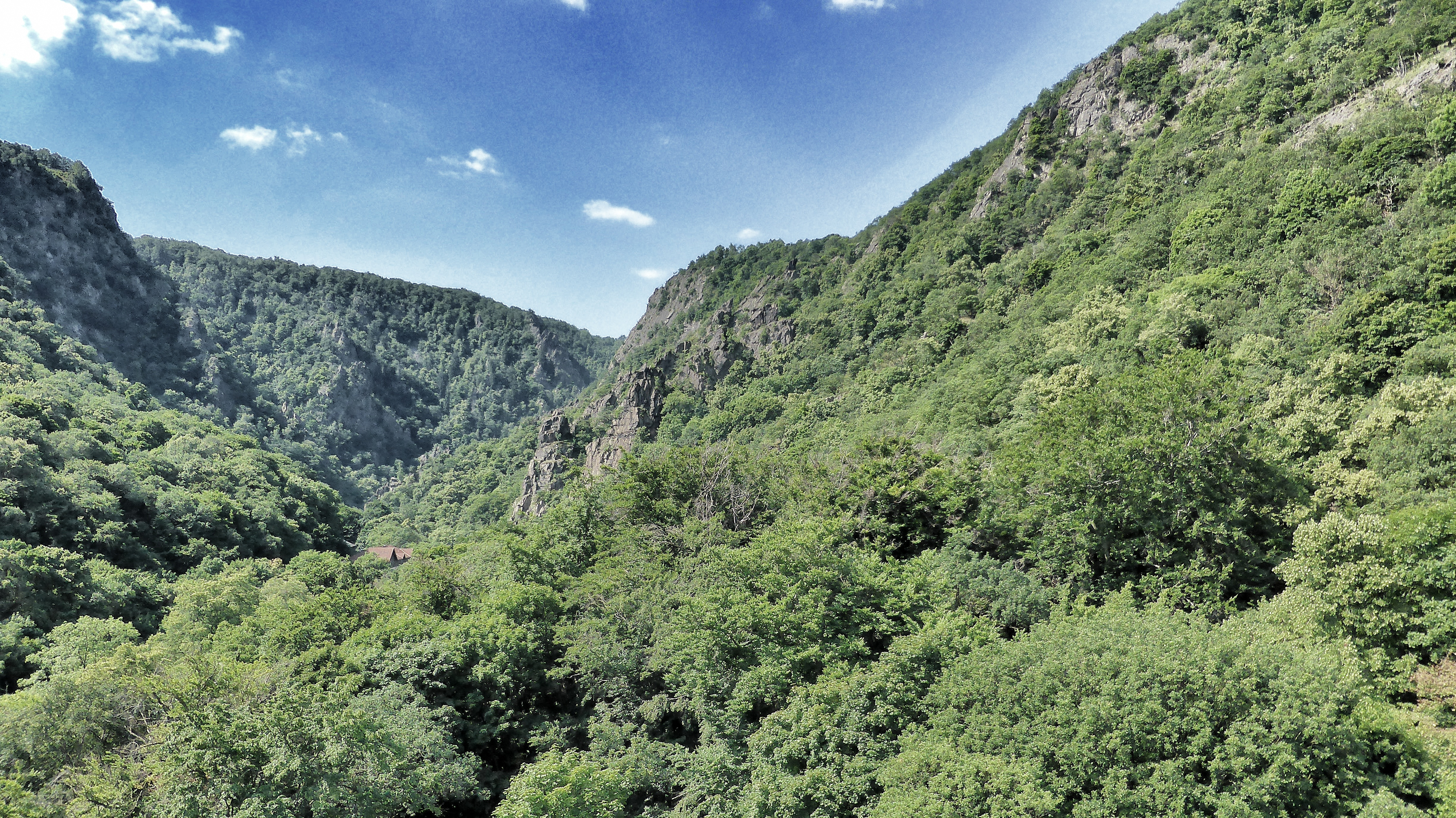 Blick ins Bodetal bei Thale